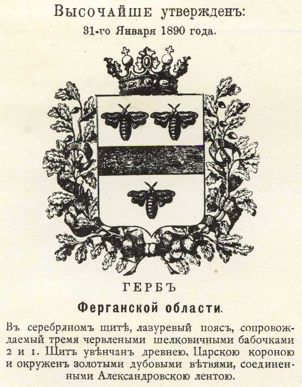 Official Russian Empire coat of arms Fergana Oblast. Герб Российской Империи Ферганской области с официальным описанием в Гербовнике Винклера.